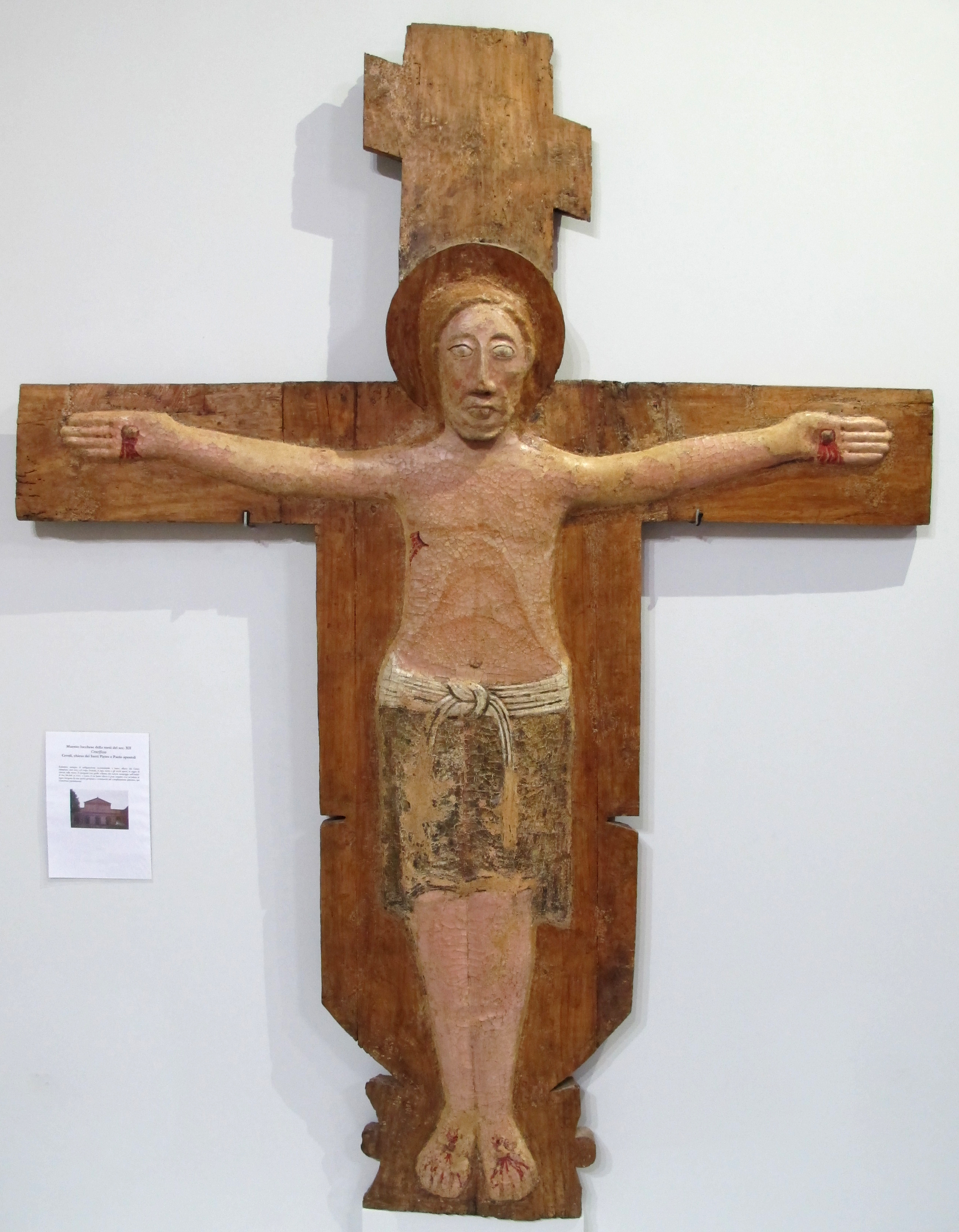 chiese di San Miniato